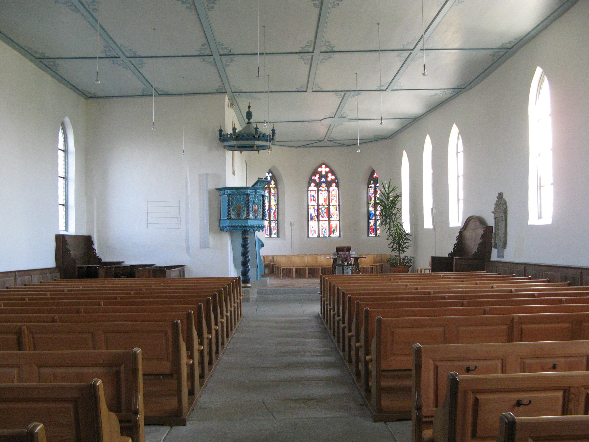 Innenraum der Staufbergkirche